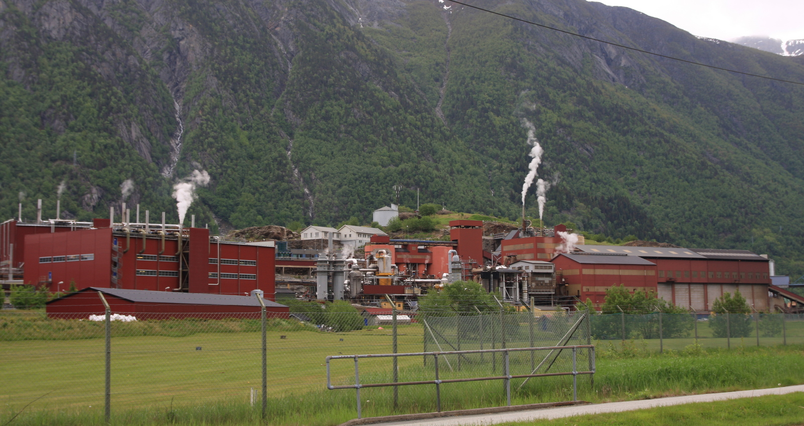 Boliden Odda